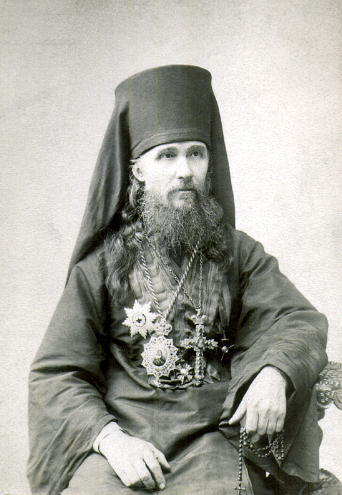 Епископ Бийский Макарий (Невский) с 1884 по 1891 гг.